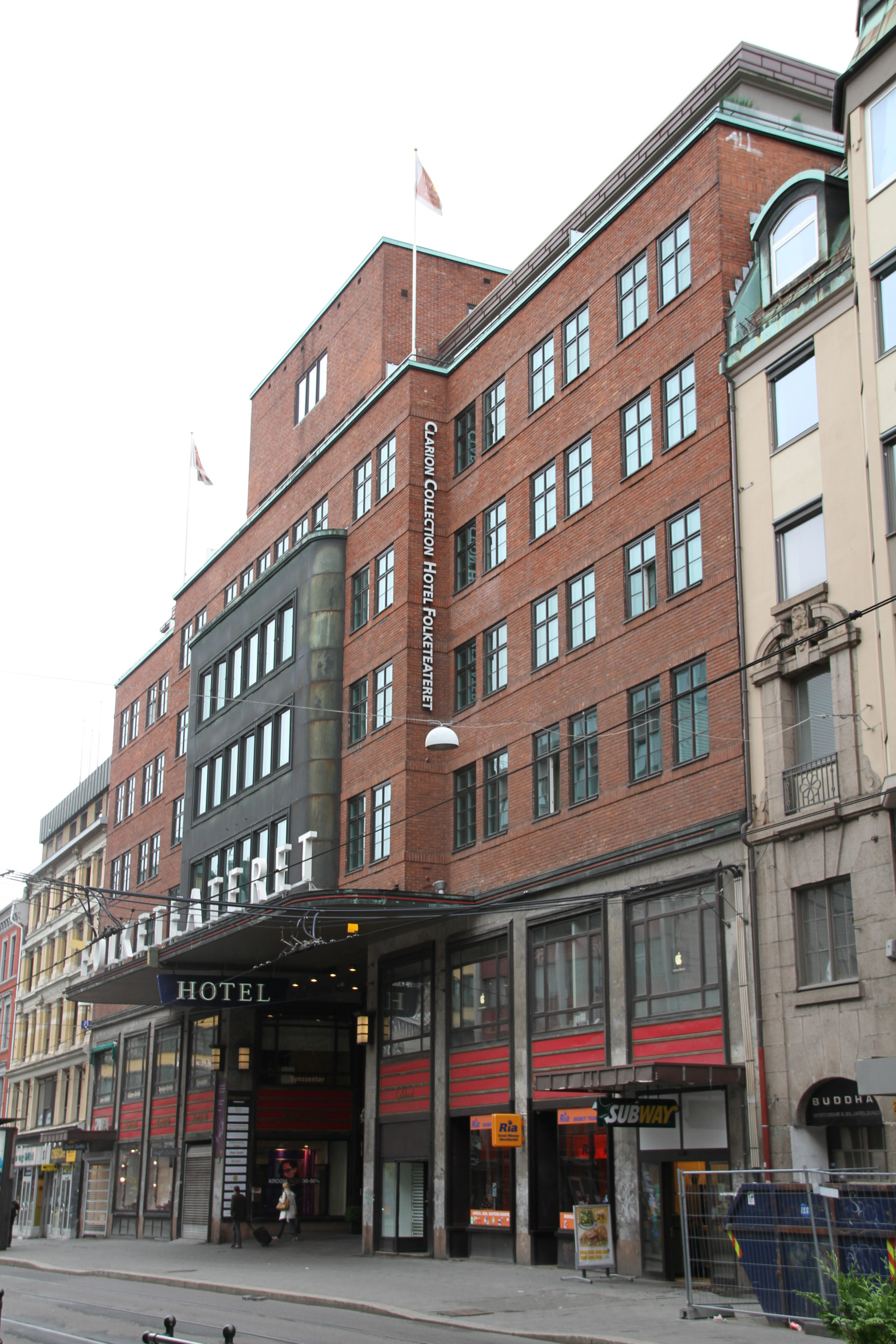 Folketeaterbygningen, baksiden sett fra Storgata, Oslo